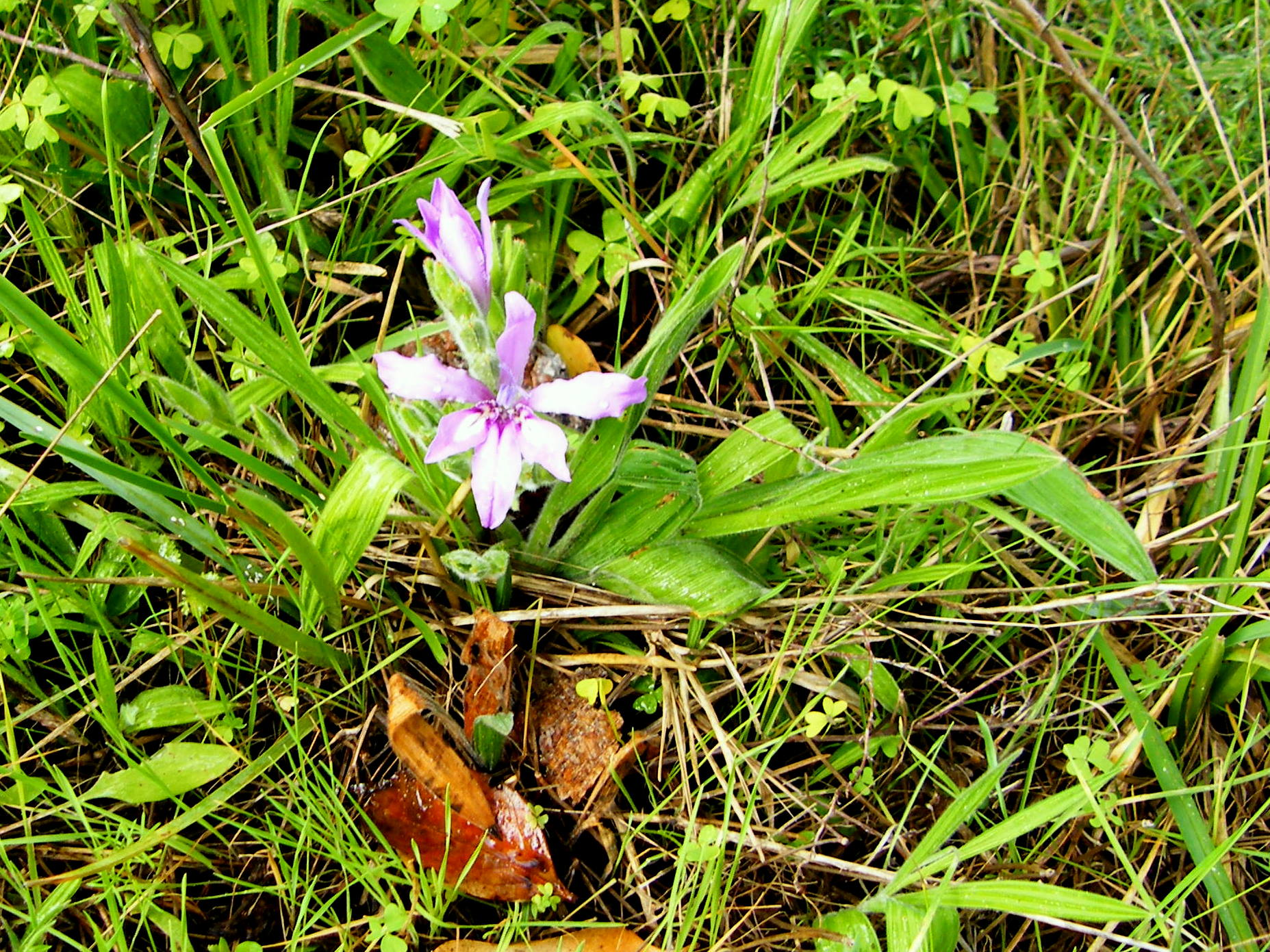 Bobbejaantjie